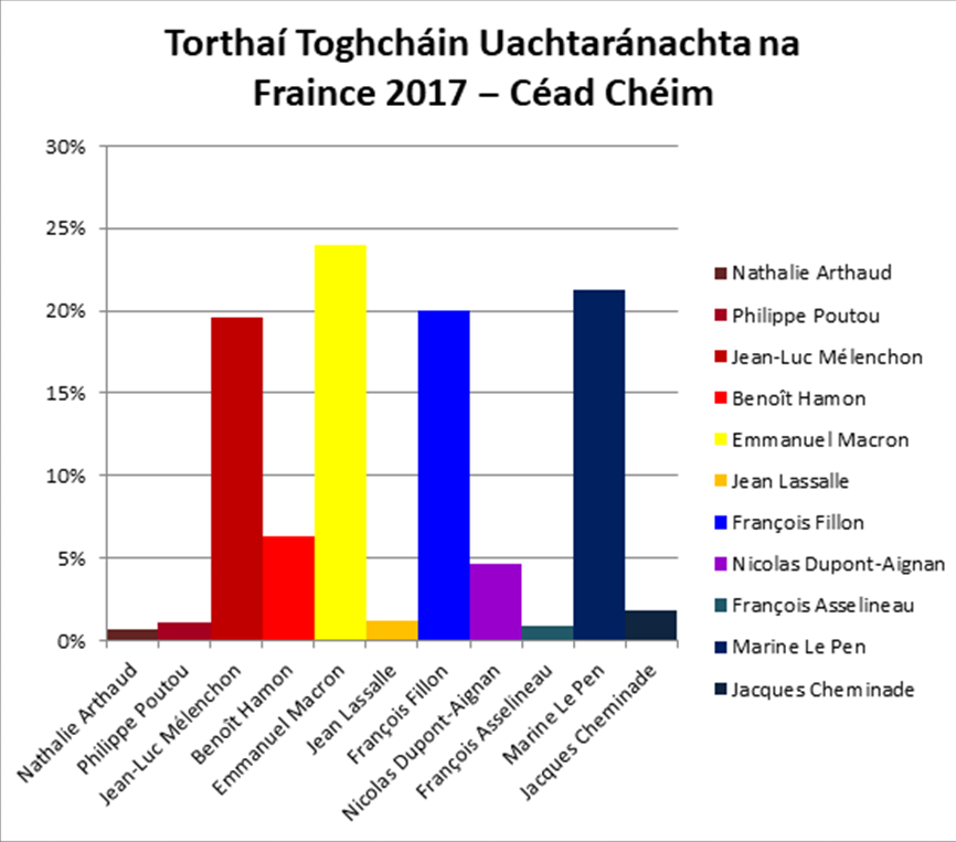 Torthaí Toghcháin Uarachtánachta na Fraince 2017 - Céad Chéim